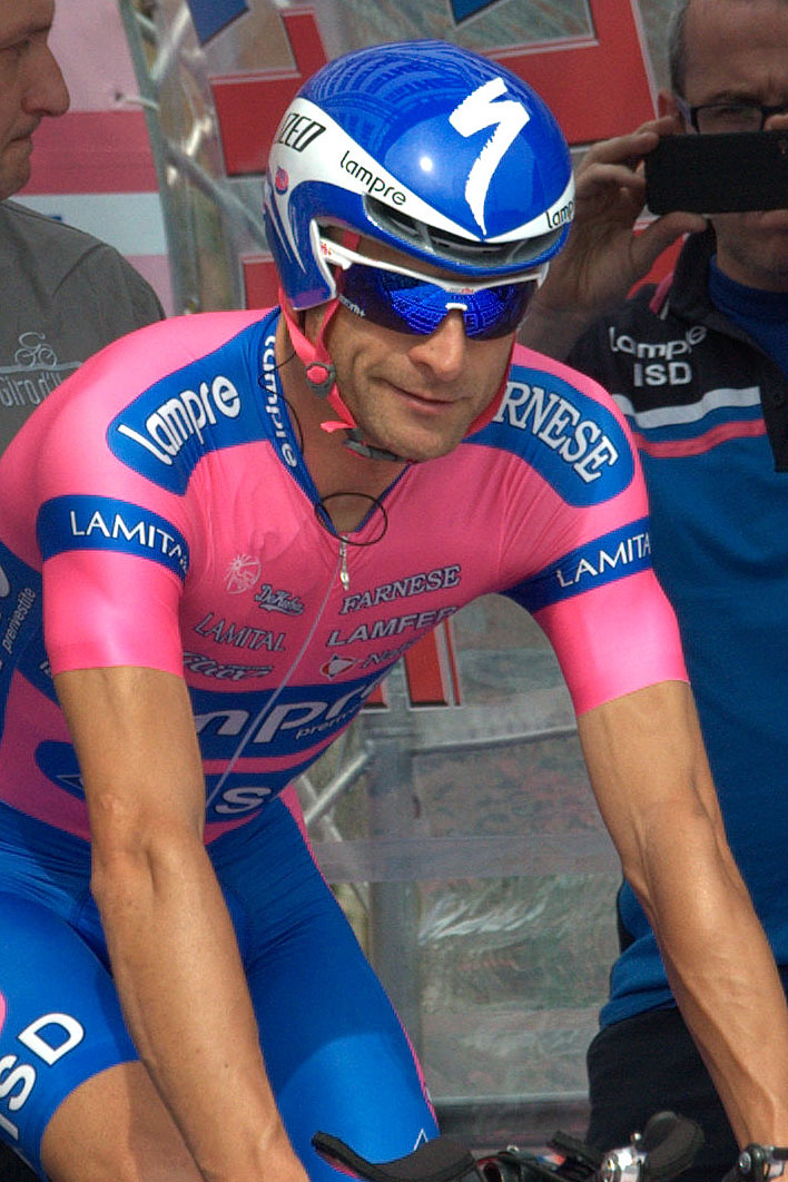 Michele Scarponi alla partenza della 21ma tappa del Giro d'Italia 2012